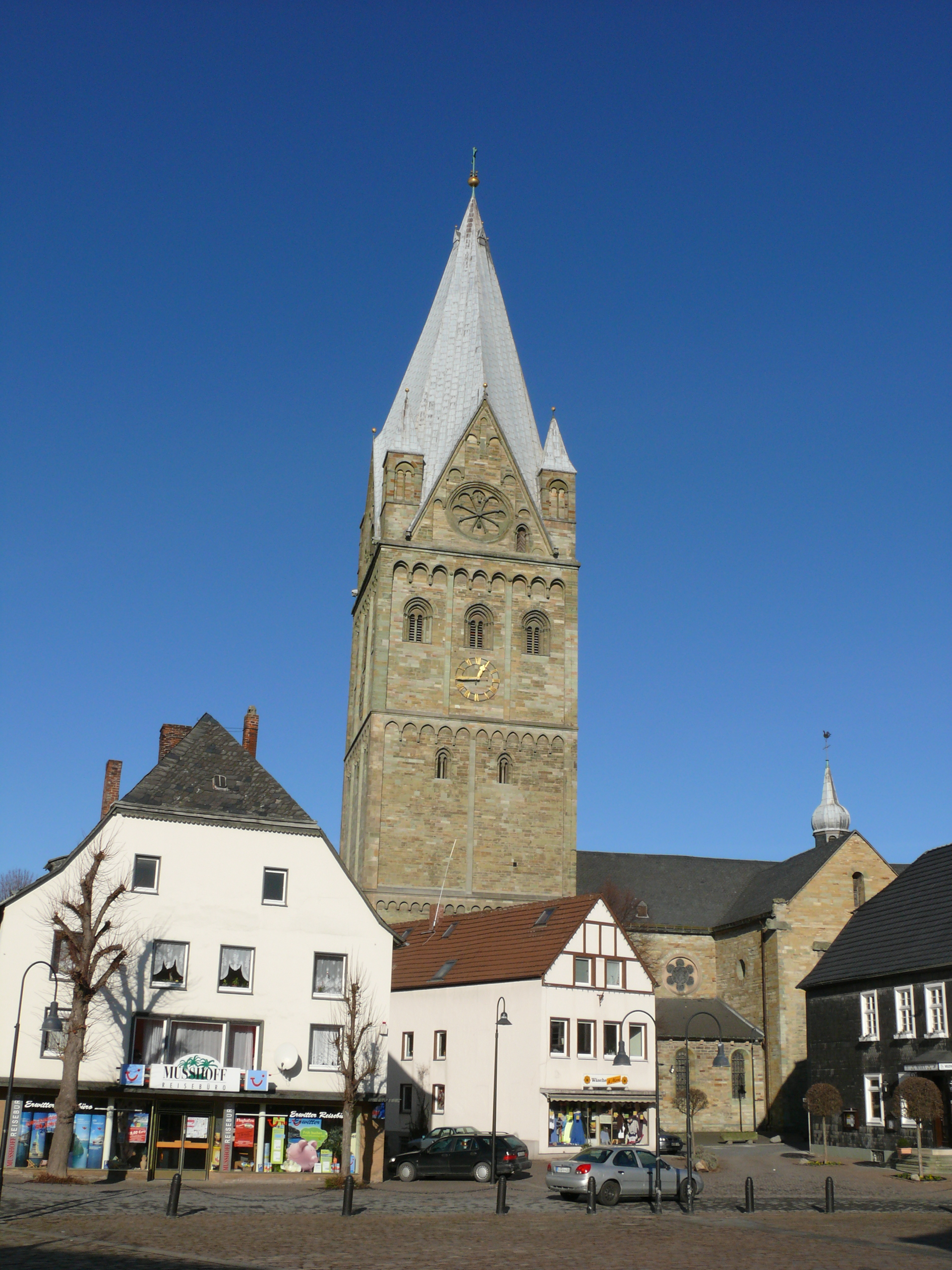 Die St. Laurentiuskirche in Erwitte.